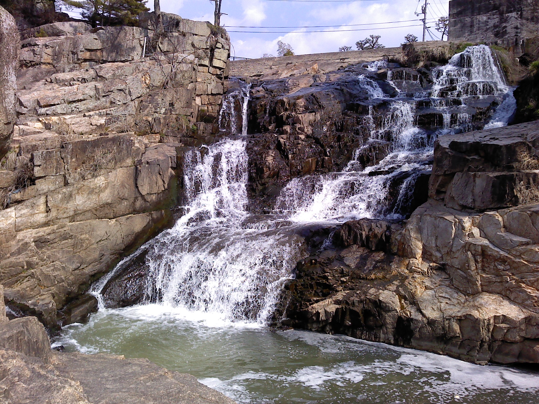 吾妻子の滝の写真